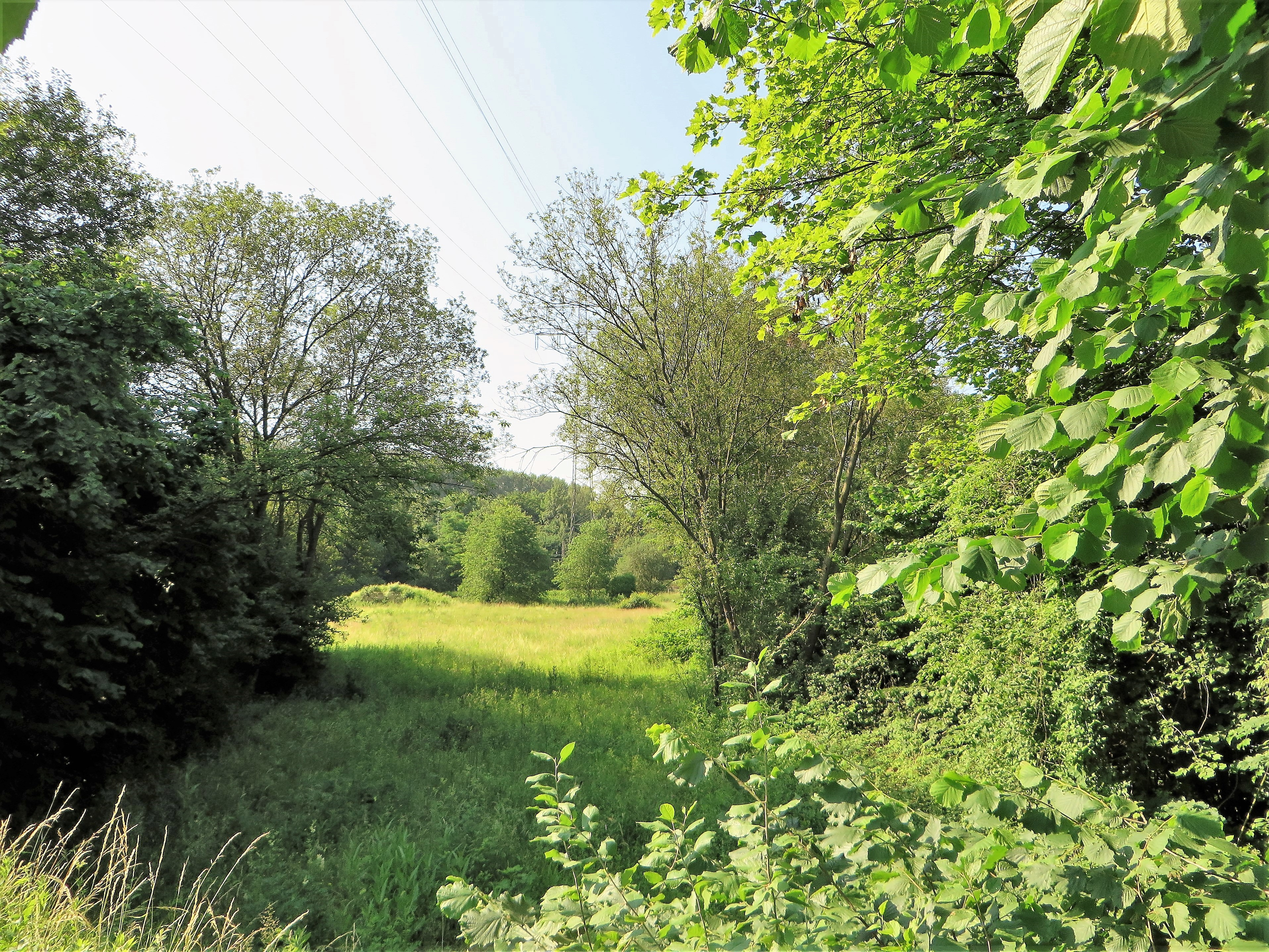 Geschützter Landschaftsbestandteil 1.4.2.25 „Unterer Ölmühlenbach“ in Hagen zwischen Dolomitstraße und Bahnstrecke unterhalb der Autobahnbrücke bei Halden. Es handelt sich um einen begradigten und befestigten Bachabschnitt sowie um großflächige Ruderalfluren im Verbuschungsstadium mit eigelagerten Tümpeln, Kiesbänken, ausgeprägten Reliefstrukturen und Brutplätze u.a. von Uferschwalben.